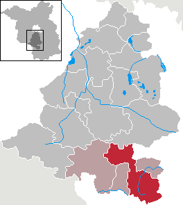 Dahme/Mark in Brandenburg (Country) - District Teltow-Fläming